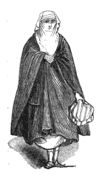 Yaşmak ve Ferace giyinmiş bir Osmanlı kadını.